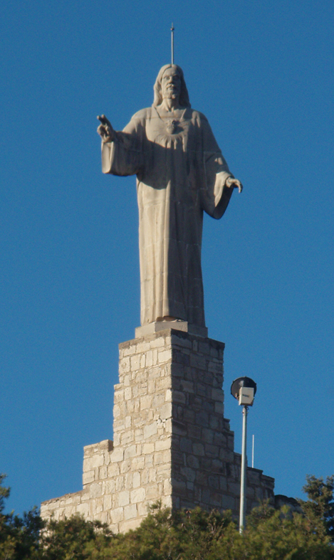 Estatua del Sagrado Corazón de Jesús (Tudela), en 2010